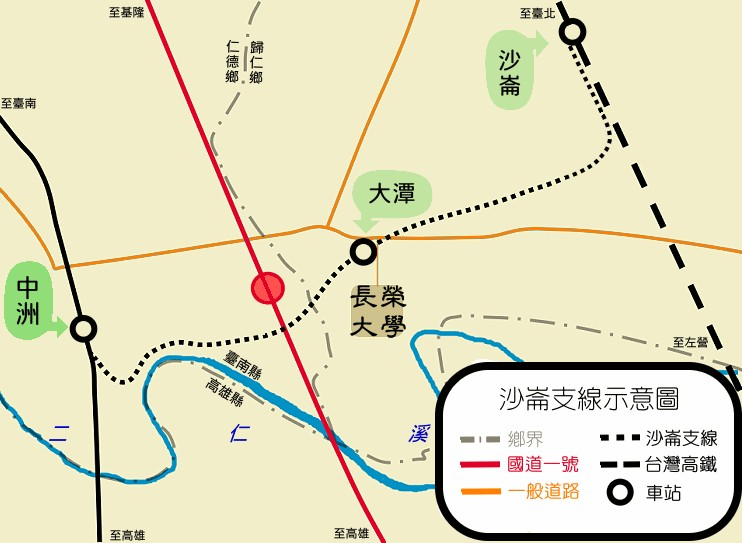 臺鐵沙崙線示意圖。